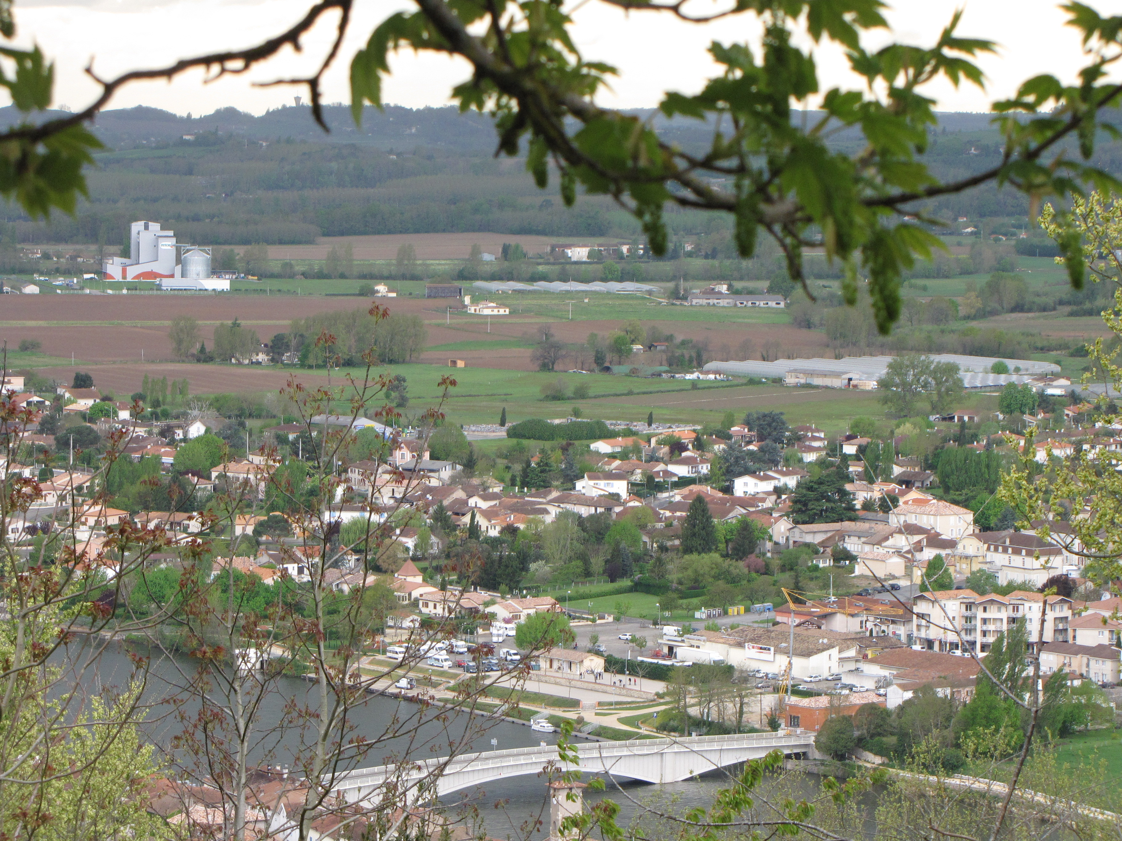 Saint-Sylvestre-sur-Lot